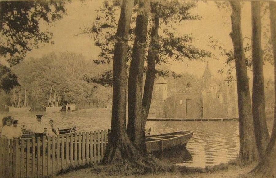 Gdańsk Stogi - jezioro Pusty Staw w parku na Stogach (przed 1945 Heidsee).